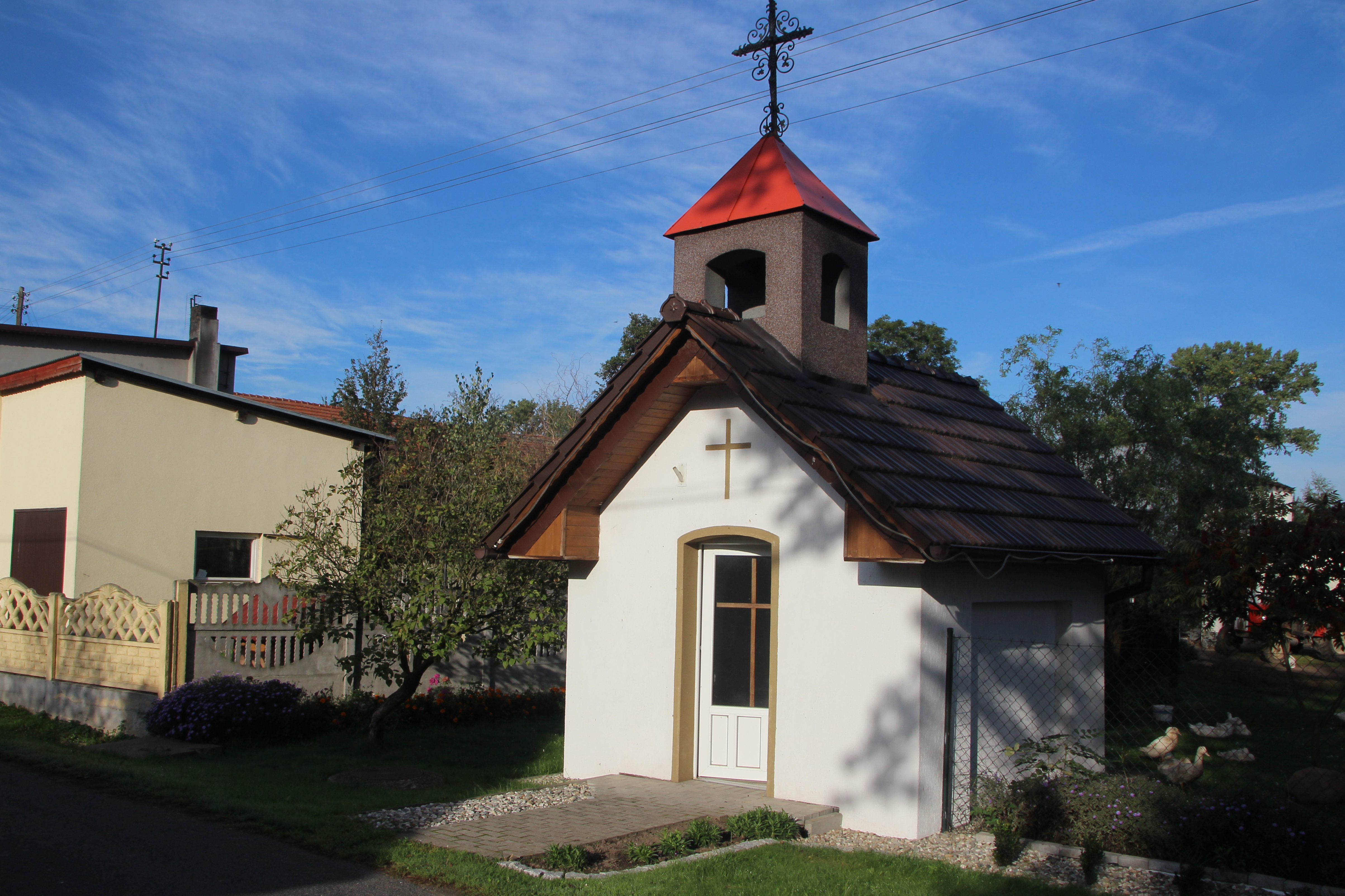 Kaplica w Przedborowicach – wieś w Polsce w województwie opolskim, w powiecie kędzierzyńsko-kozielskim, w gminie Pawłowiczki.